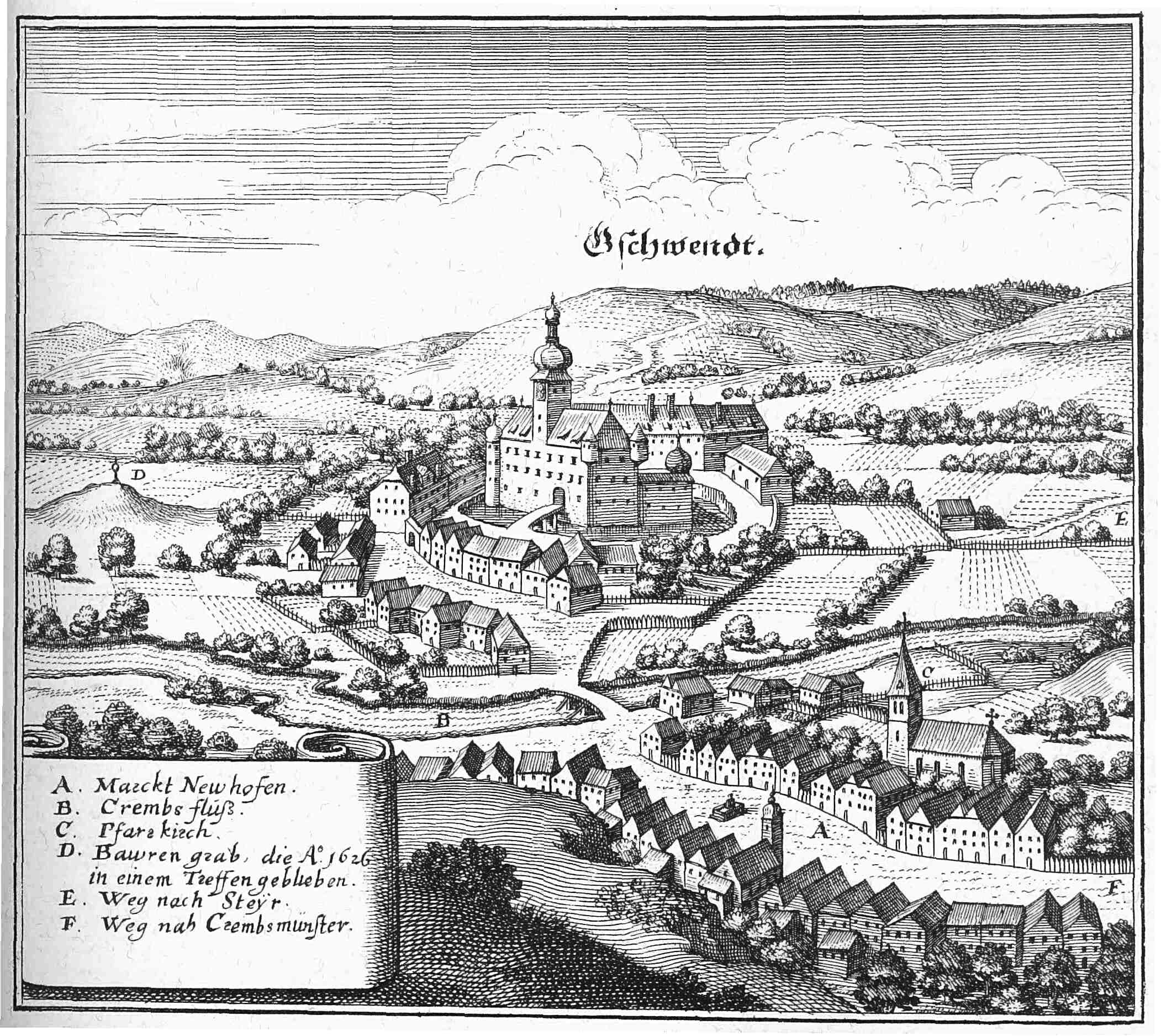 Schloss Gschwendt nach einem Stich von Matthaeus Merian (1656)